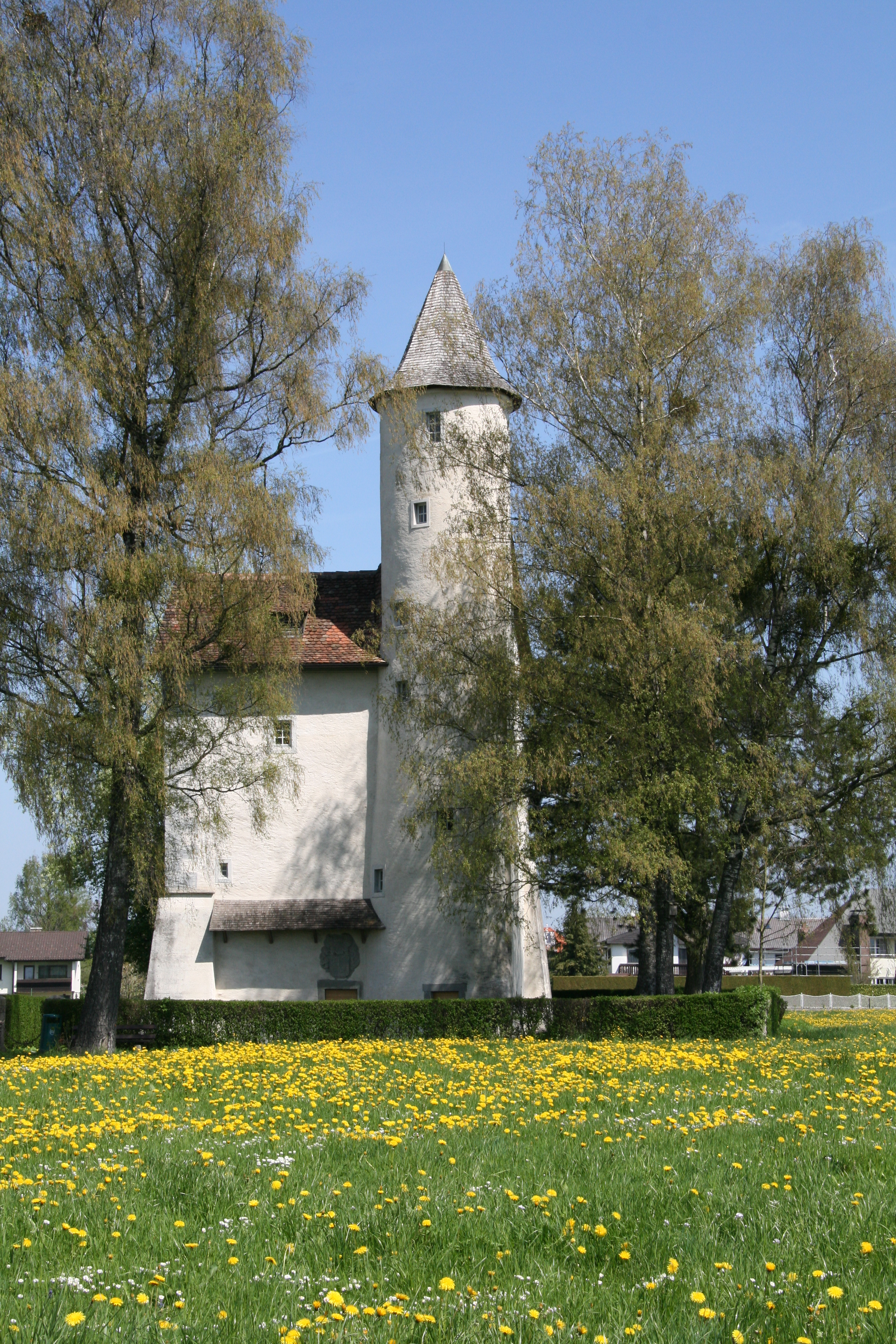 aus dem DEHIO Vorarlberg 1983: Ansitz Mittelweiherburg. Als Rest der ursprünglichen Gesamtanlage nur noch der westliche Nebentrakt mit seitlichem Treppenturm erhalten; 3geschossiger Rechteckbau unter steilem Satteldach; der stark überhöhte Turm über rundem Grundriss; 6eckiges Zeltdach, Steinspindel. Unregelmässig verteilte Fenster in Sandsteinrahmung, an der Ost-Front Spuren des abgebrochenen Haupttraktes. Über dem Rechteckportal in der Süd-Front Wappenstein der Deuring, Sandstein, 17. Jh. - Im Inneren 1957-1962 ausgebaute Schauräume des Heimatmuseums mit lokalgeschichtlicher Sammlung und Exponaten zur Technik der frühindustriellen Formstecherei und des Stoffhanddruckes. Felderdecke 17 Jh. mit Vierpassmotiv im Mittelfeld aus dem abgebrochenen Wirtshaus zum Zoll an der Lauteracher Bregenzerach - Brücke. *** bekannt unter "Textildruckmuseum" an der Rotachstrasse in Hard, Vorarlberg Veröffentlicht: Georg Kessler in "Freizeit im Ländle, Die schönsten Ausflugziele in Vorarlberg ISBN 978-3-7022-3068-5 2010